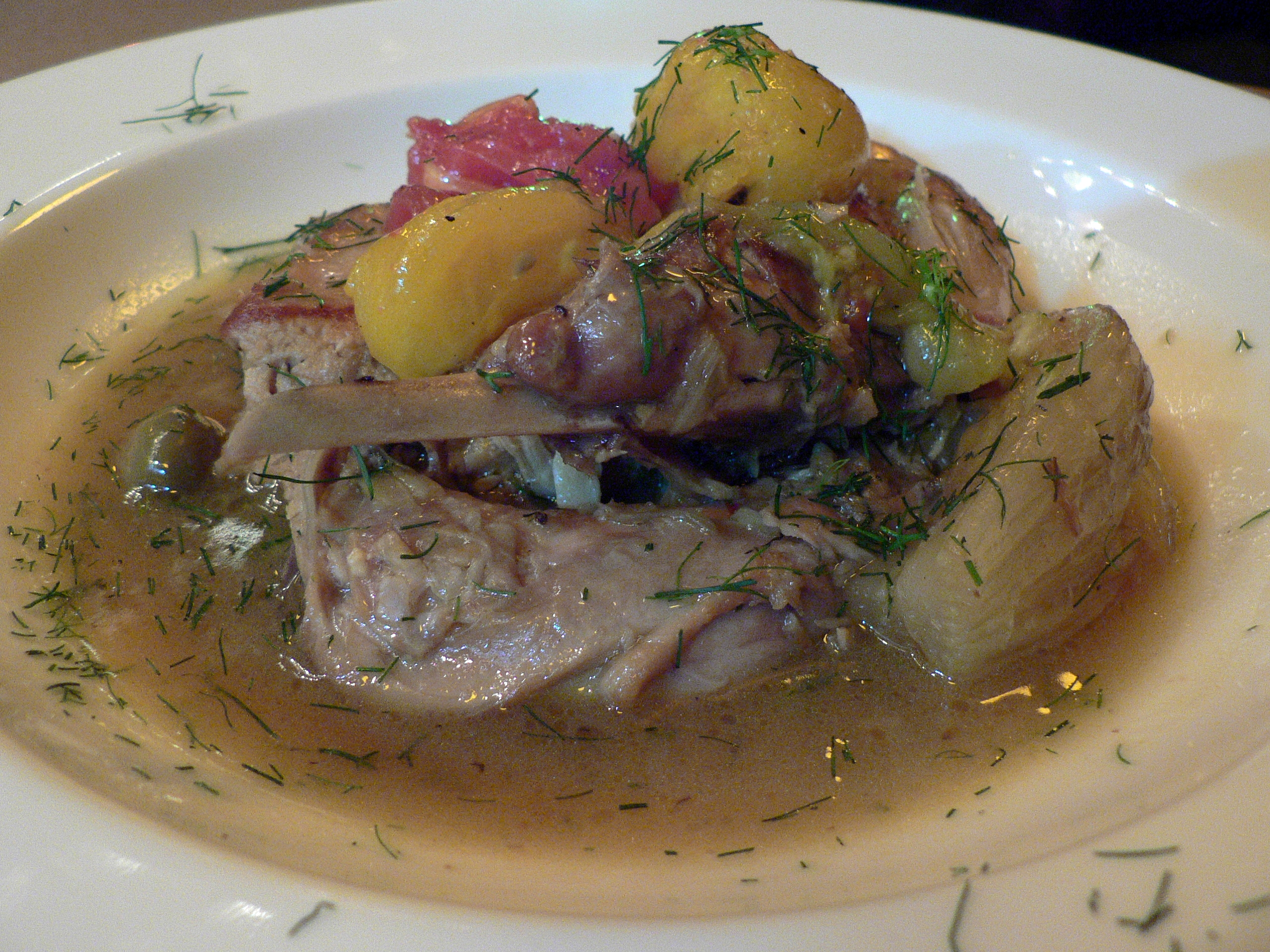 Civet de lapin aux USA